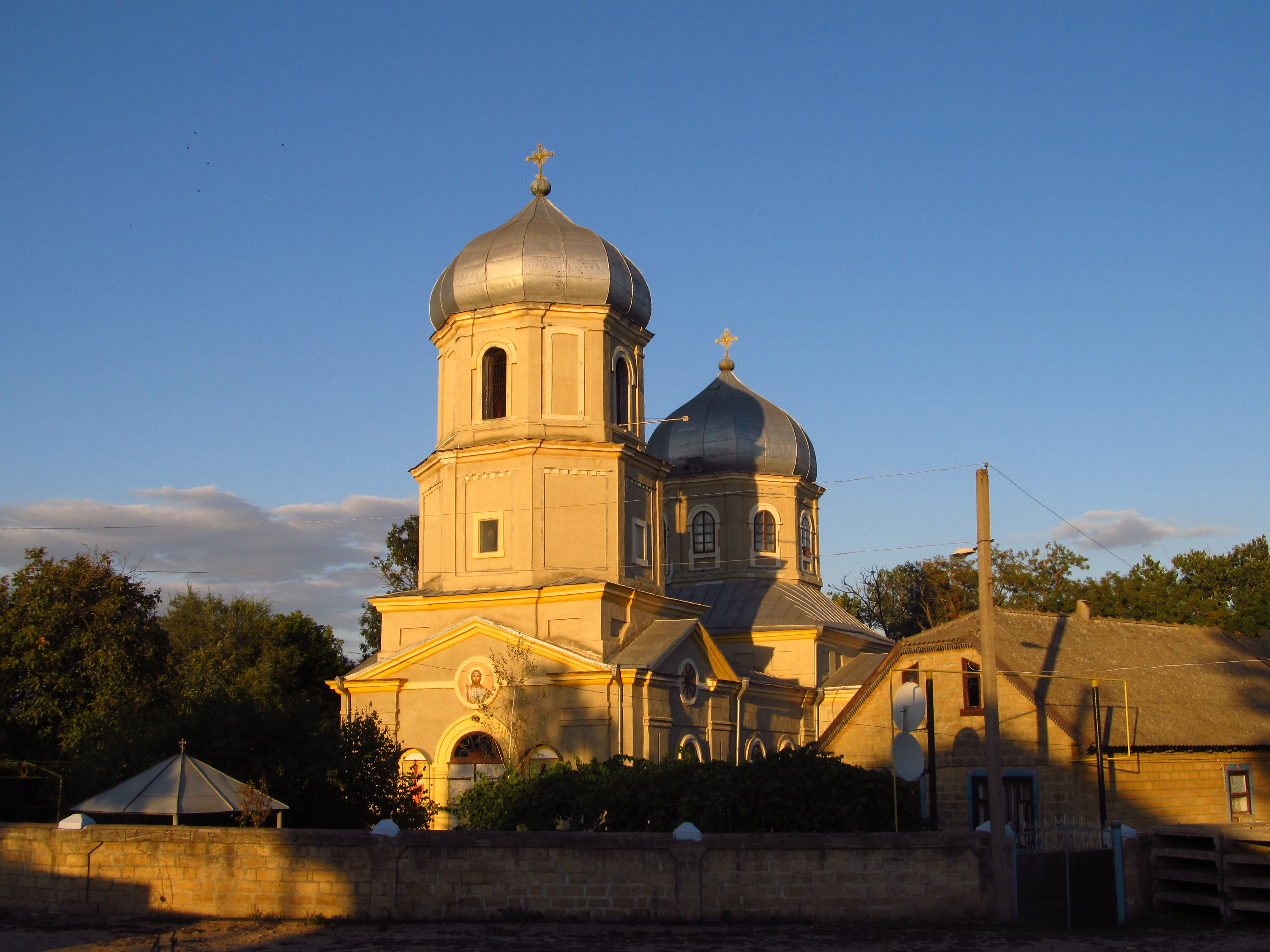 Церква Петра і Павла в с. Городне Болградського р-ну